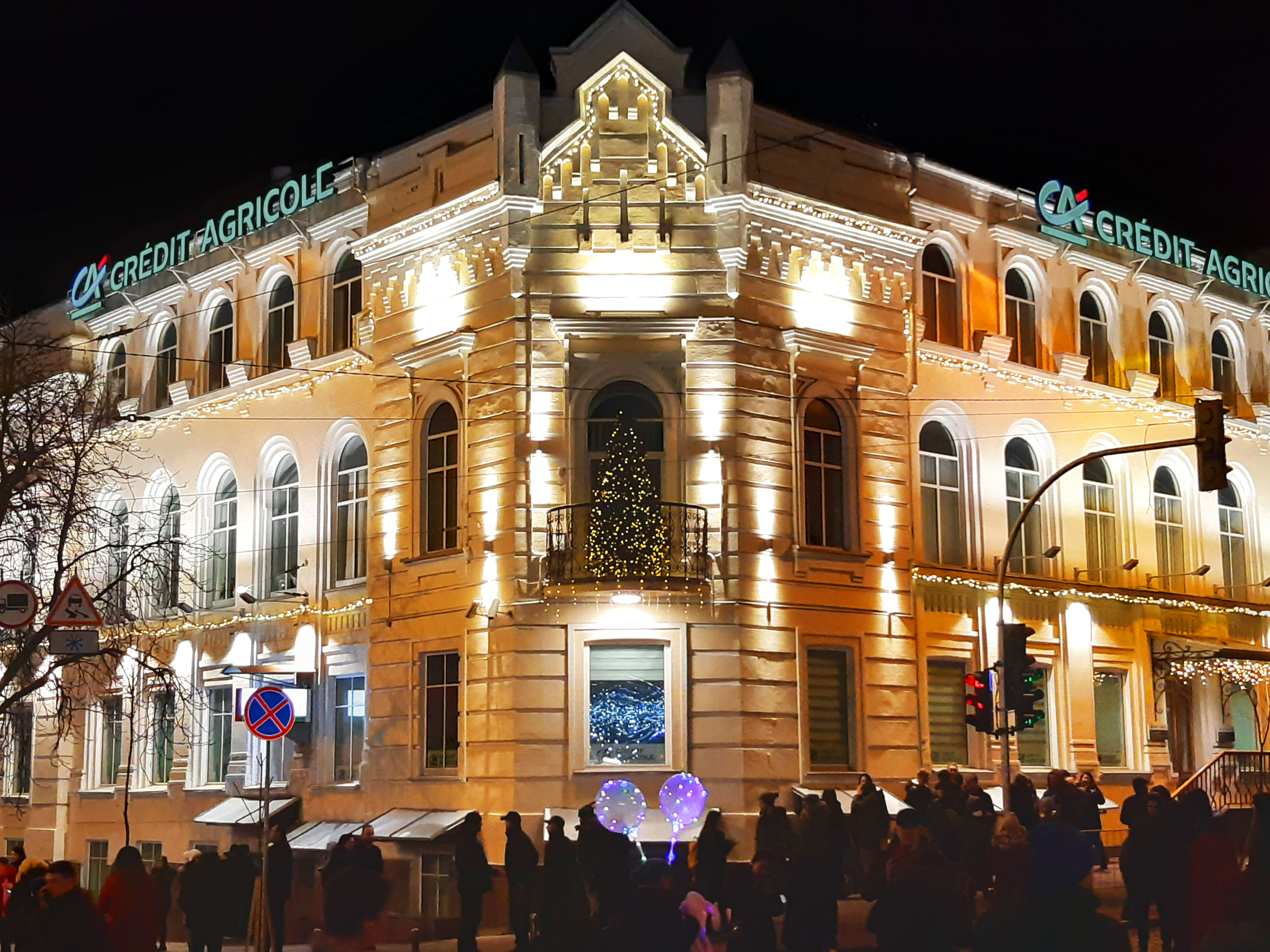 Будинок прибутковий купця Ф. Міхельсона, Київ, вул. Володимирська, 23/27